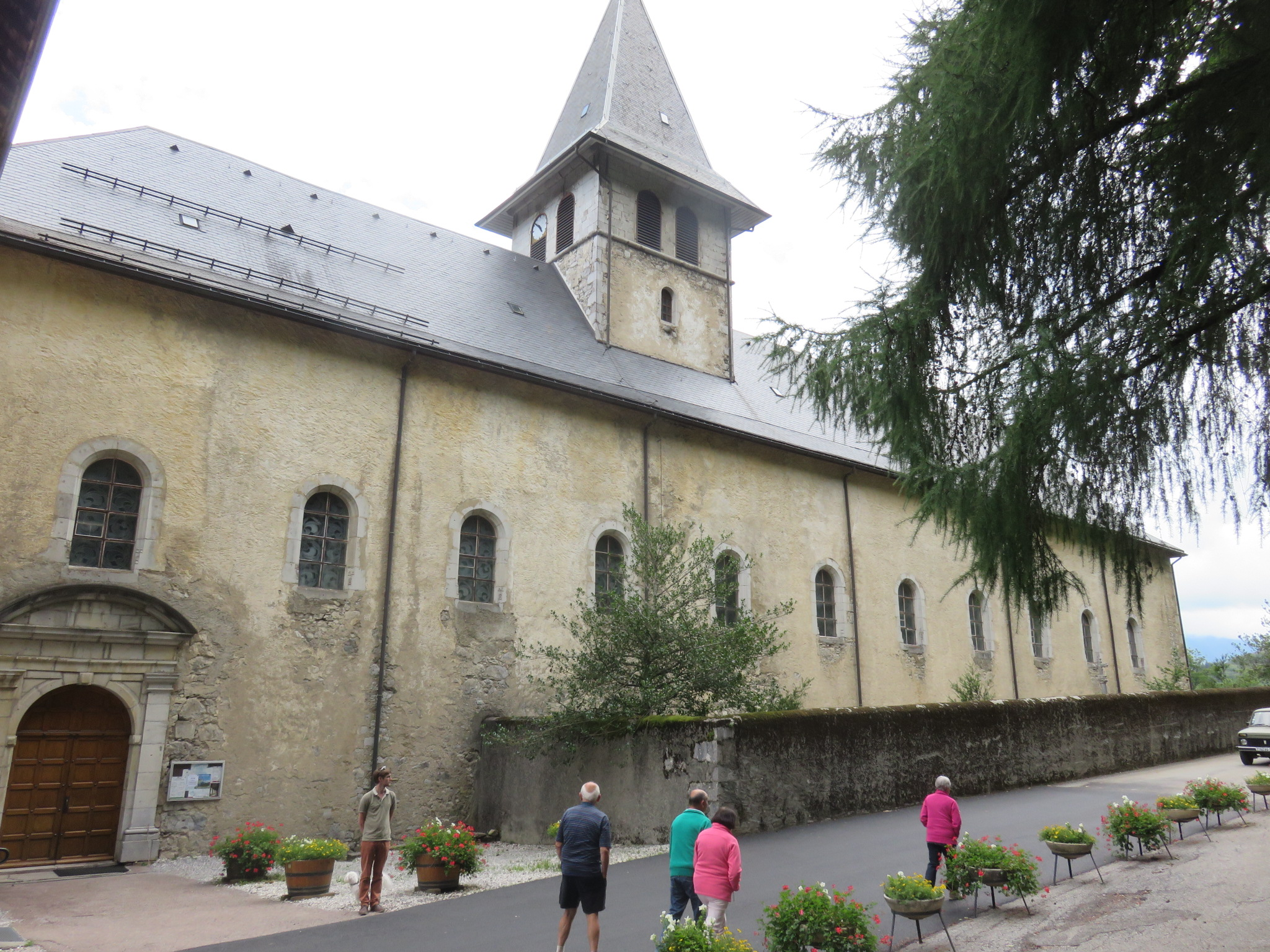 Abbey of Tamié